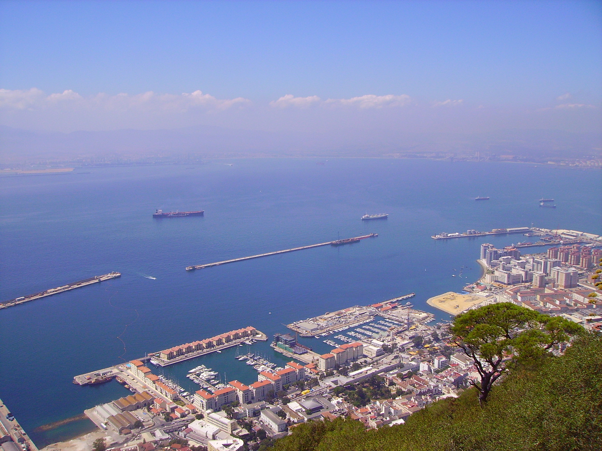 Pohled na Gibraltar z vyvýšeného místa - skály (the Rock)